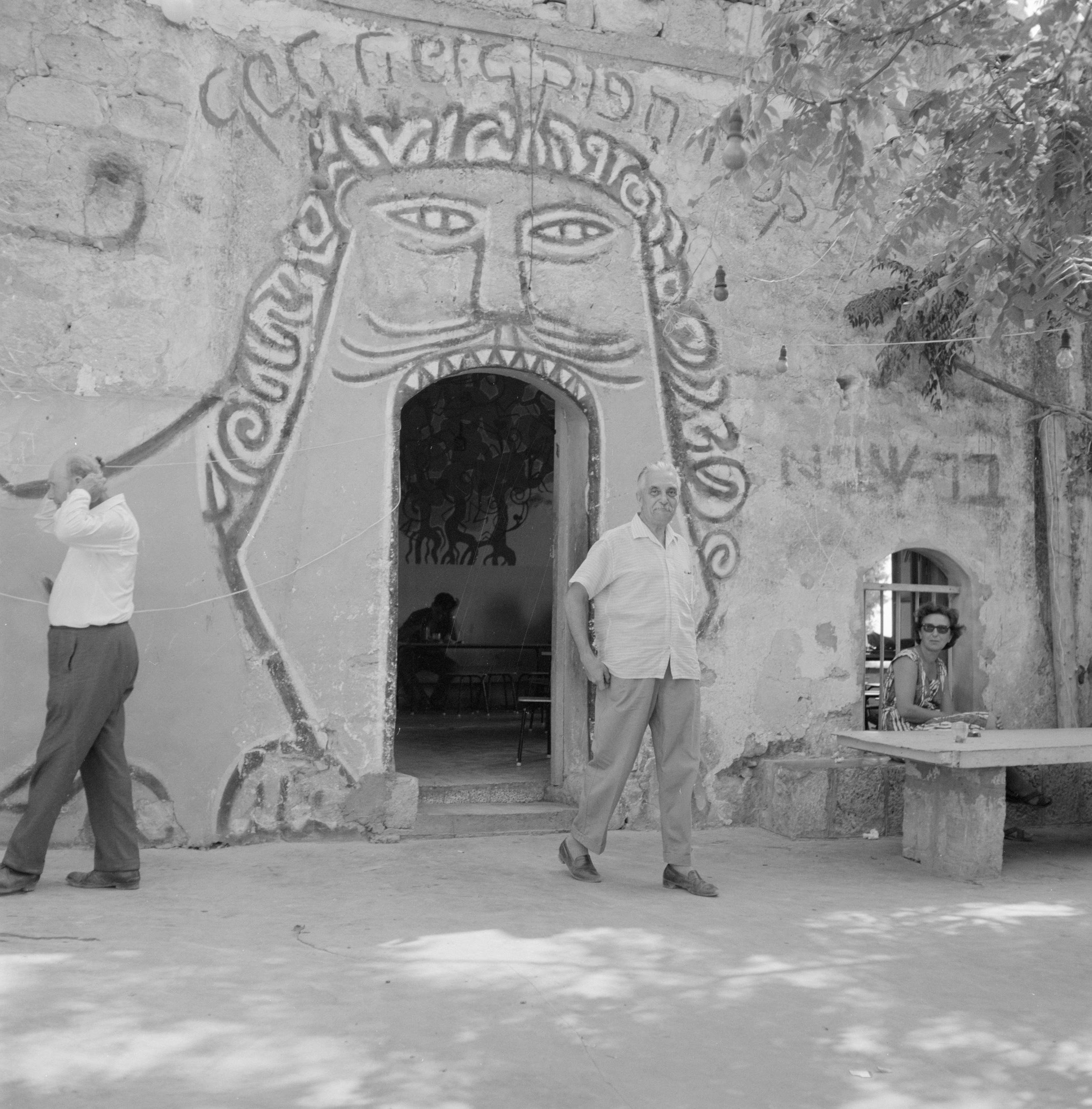 Collectie / Archief : Fotocollectie Van de Poll Reportage / Serie : Israël 1964-1965. Ein Hod Beschrijving : Burgemeester Marcel Janco verlaat een beschilderde toegangsopening van een kunstcentrum. Annotatie : Het dorp Ein Hod werd in 1953 een kunstenaarskolonie op initiatief van Marcel Janco, een gerenommeerd Dada-kunstenaar. Datum : 1964 Locatie : Ein Hod, Israël Trefwoorden : burgemeesters, kunstenaarskolonies, stichters Persoonsnaam : Janco, Marcel Fotograaf : Poll, Willem van de, [onbekend] Auteursrechthebbende : Nationaal Archief Materiaalsoort : Negatief (zwart/wit) Nummer archiefinventaris : bekijk toegang 2.24.14.02 Bestanddeelnummer : 255-2754